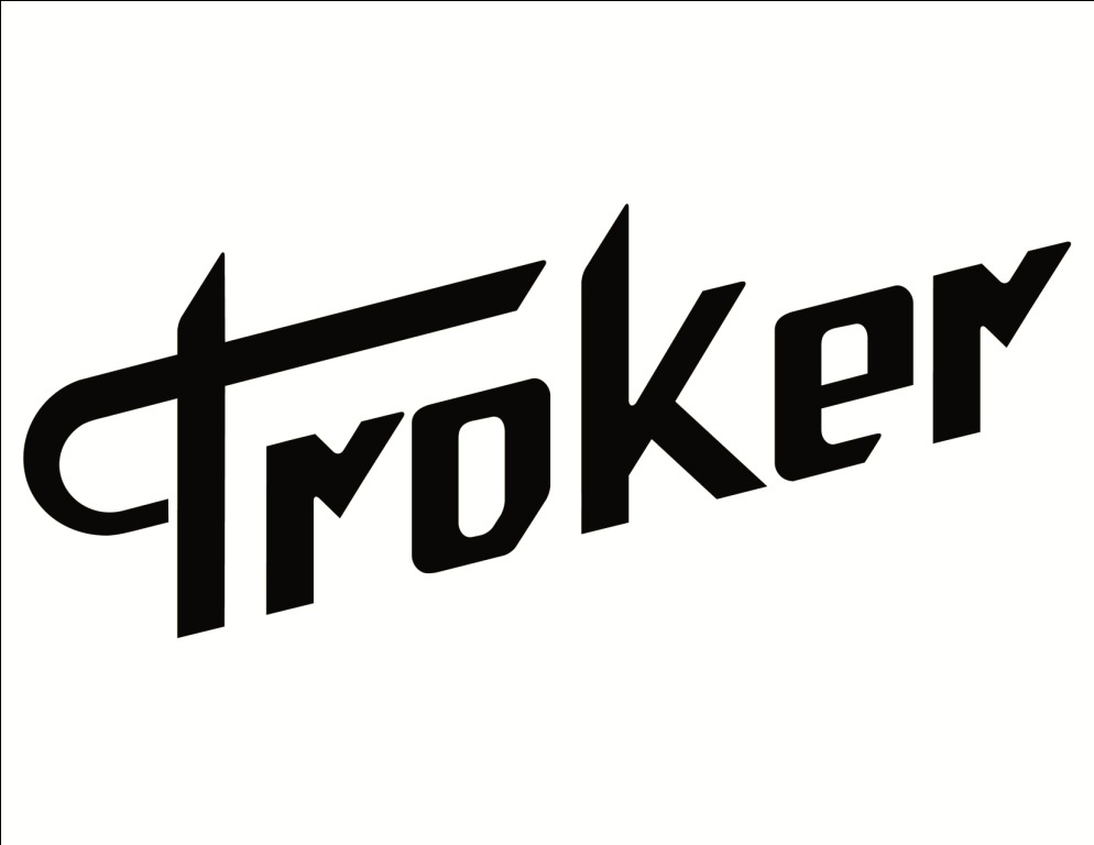 Logotipo de la banda de jazz tapatía Troker.